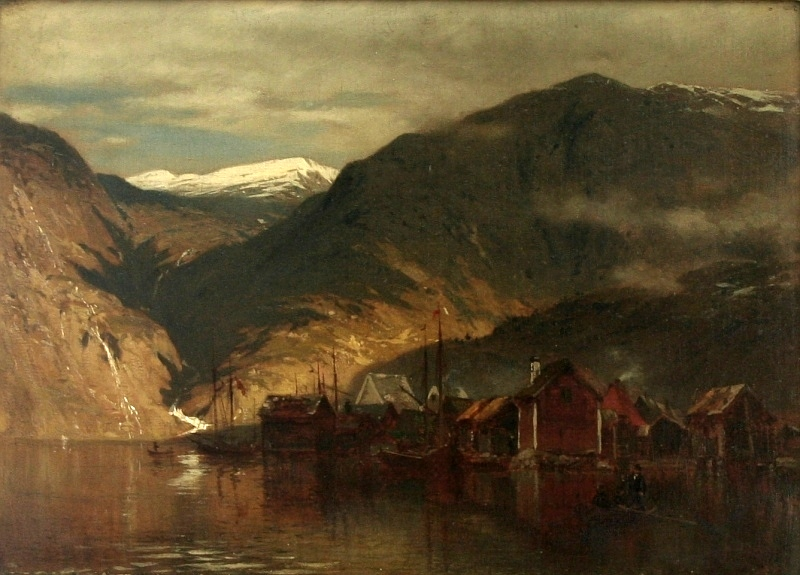 Norwegische Fjordlandschaft mit Fischerhütten. Öl auf Leinwand, 35 cm x 48 cm